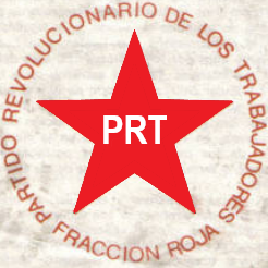 Escudo usado por la Fracción del PRT-ERP, durante sus comunicados y afiches